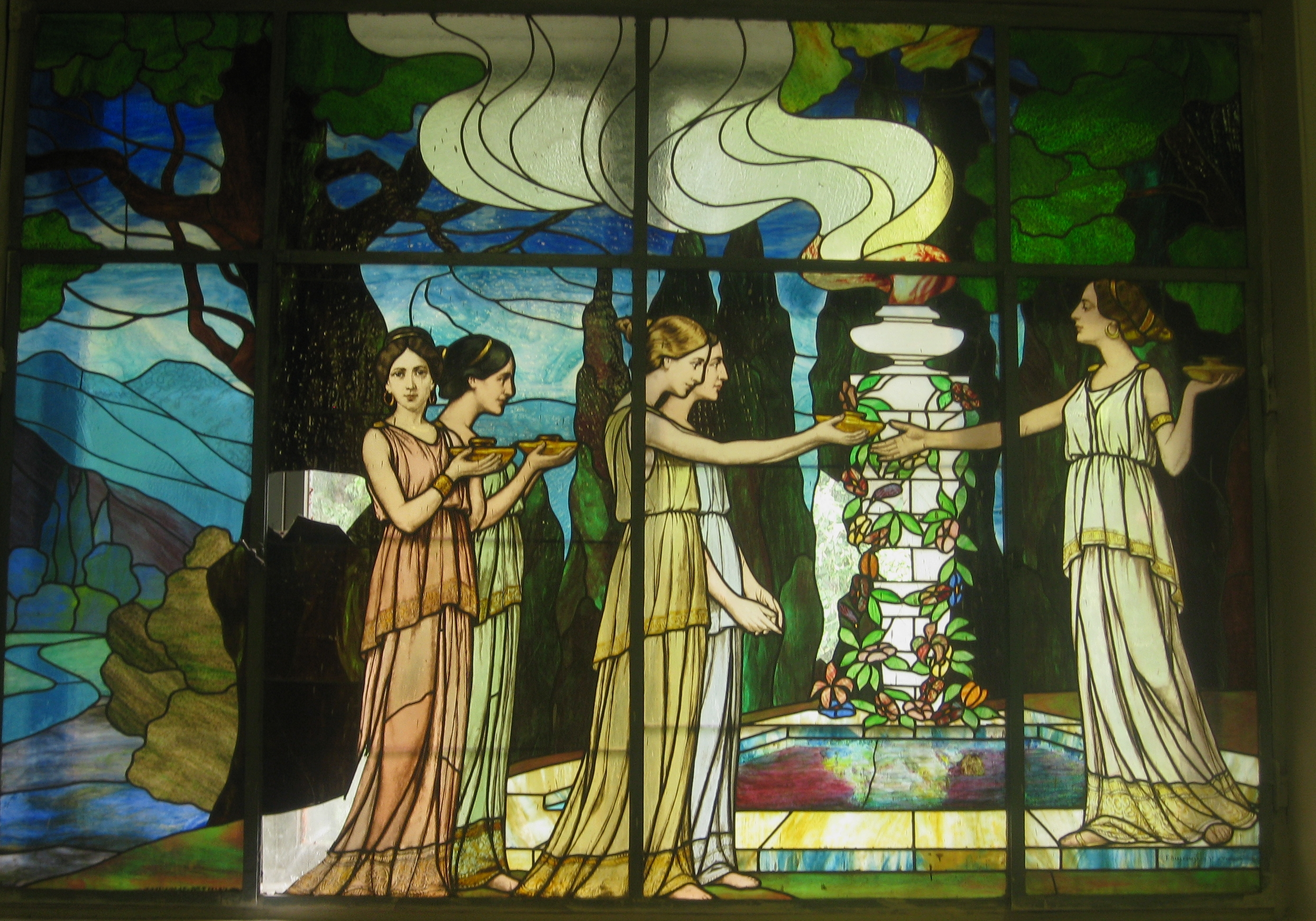 Вітраж (поч. ХІХ ст.) у Палаці польських шляхтичів Прушинських, c. Нова Чортория, Житомирська область, Україна